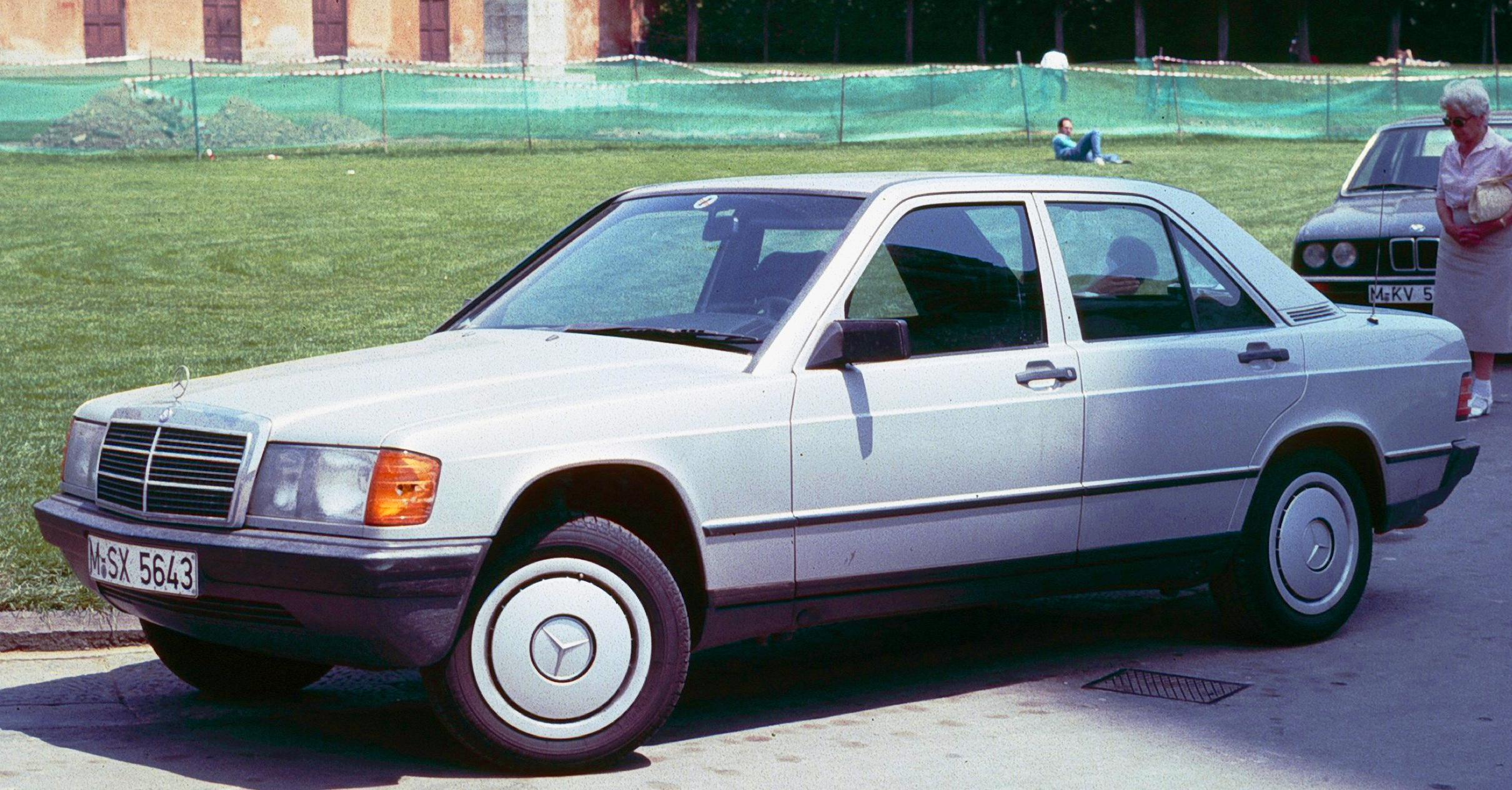 Mercedes Benz W201 aus Muenchen in Italien